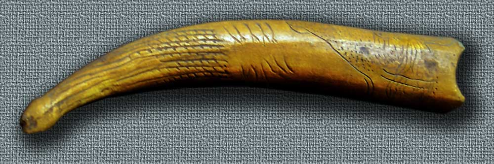 Bastón perforado de la Cueva del Valle (Cantabria, España), Paleolítico Superior (réplica). La decoración consiste en microsurcos que representan una cabeza de cierva, una serie de posibles antropomorfos y haces de líneas.